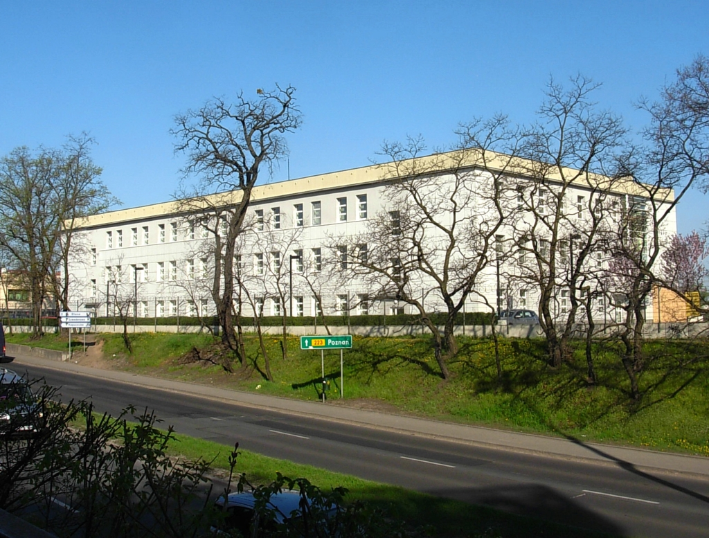 NATO Joint Force Training Centre, ul. Szubinska 2 w Bydgoszczy